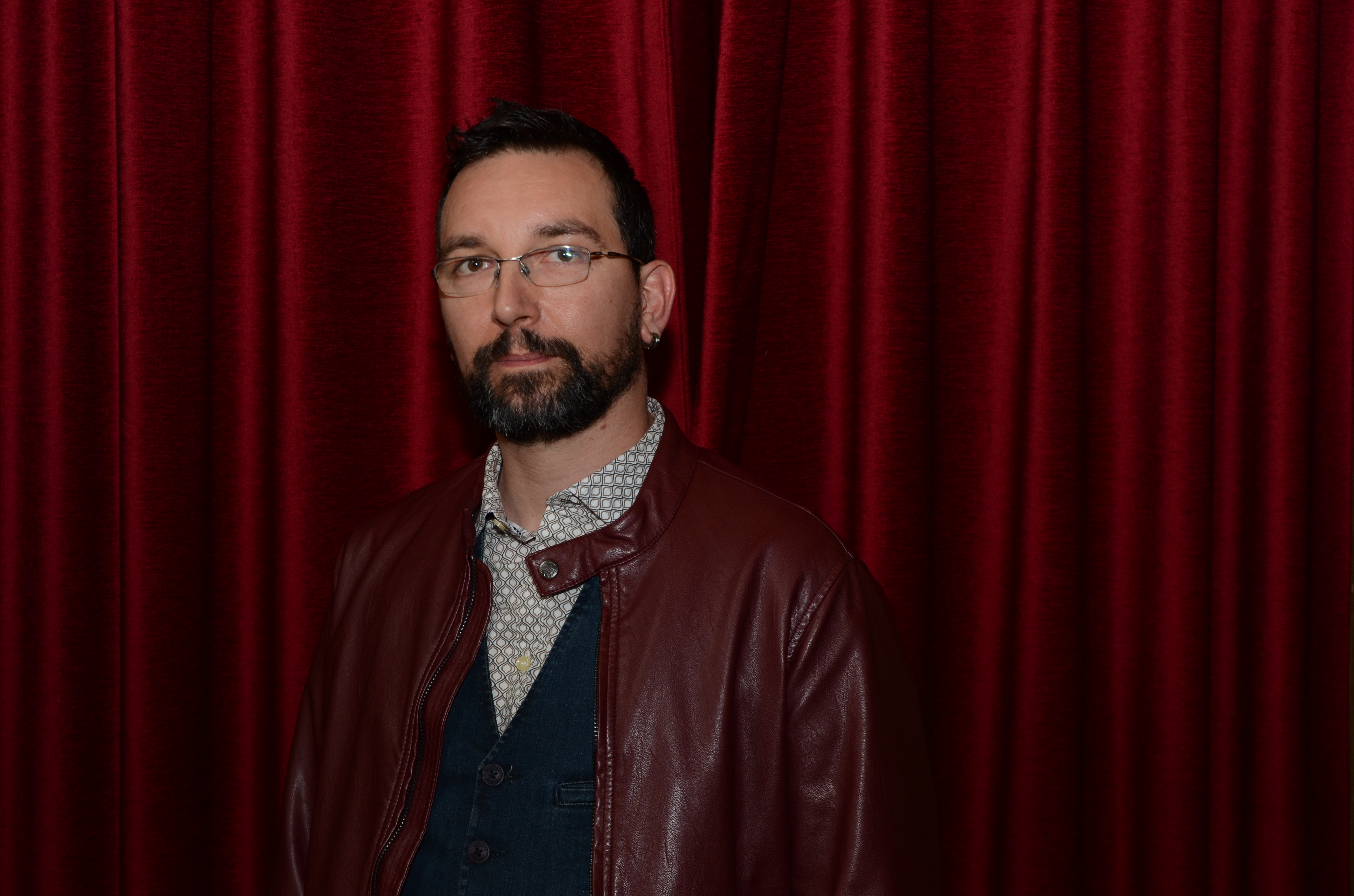 Filippo Tapparelli durante la cerimonia di premiazione del Premio Italo Calvino